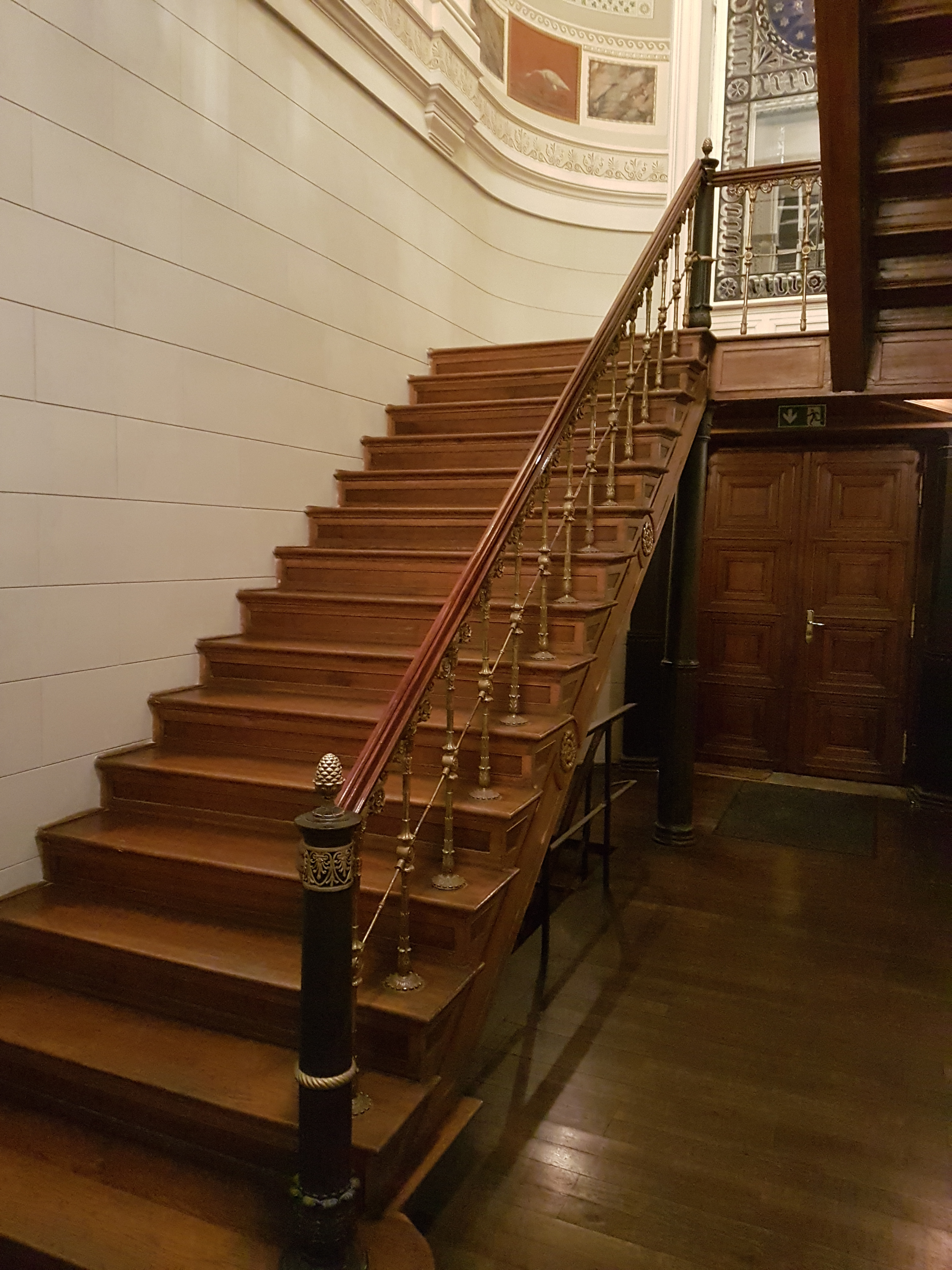 Aus dem 1967 abgerissenen Ermelerhaus in der Breiten Straße 11, Berlin, gerettetes klassizistisches Treppenhaus